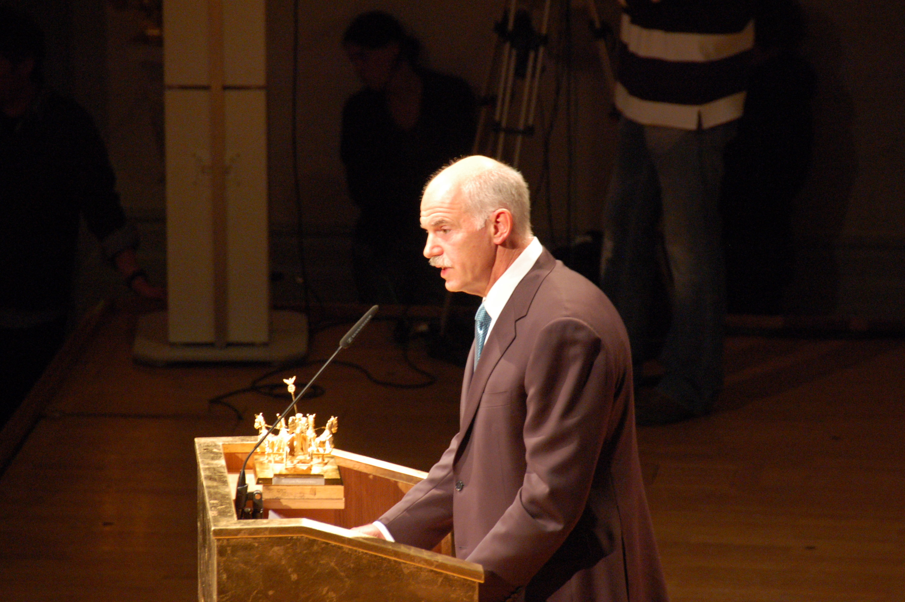 Preisverleihung Quadriga 2010